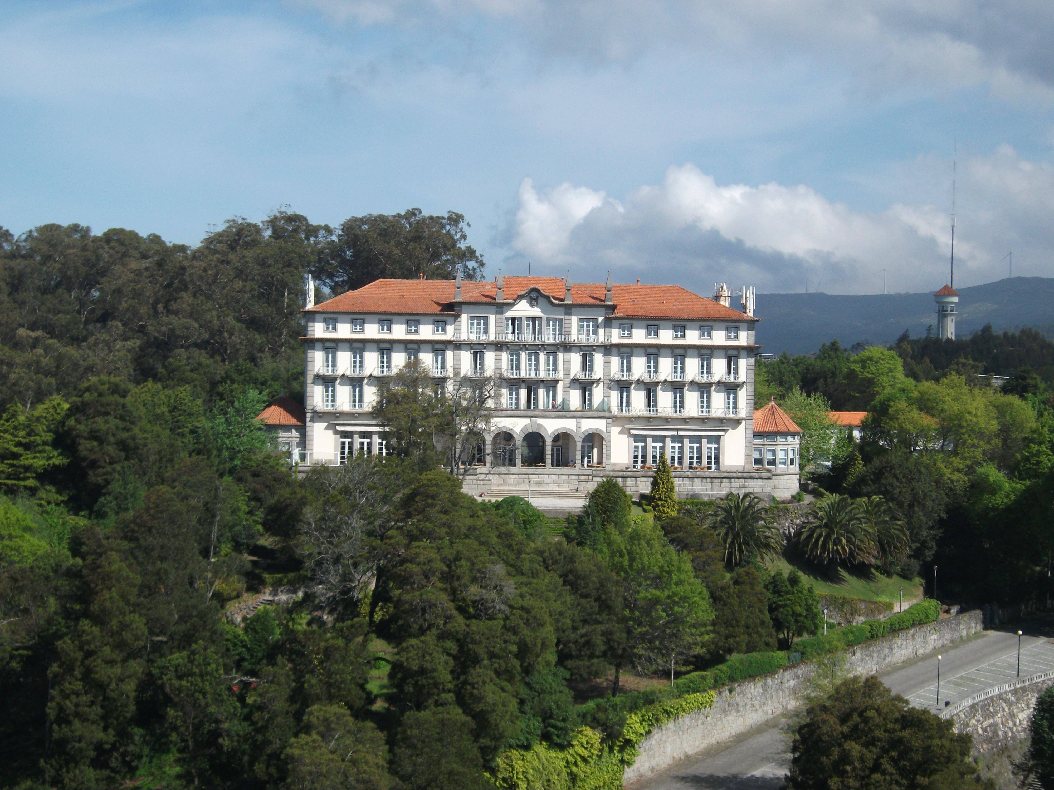 Aspecto exterior da Pousada